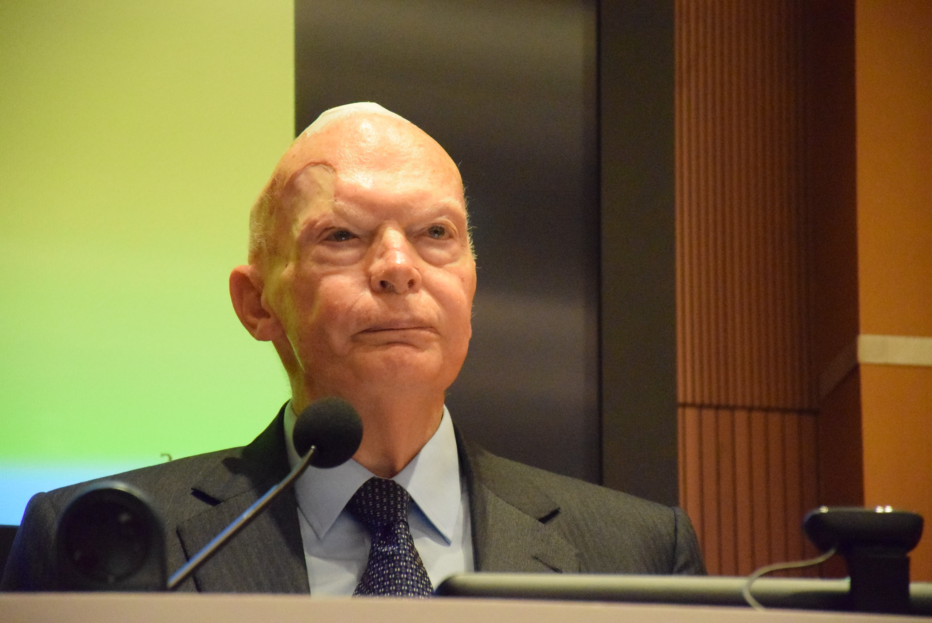 前廉政專員施百偉。（美國之音湯惠芸攝）